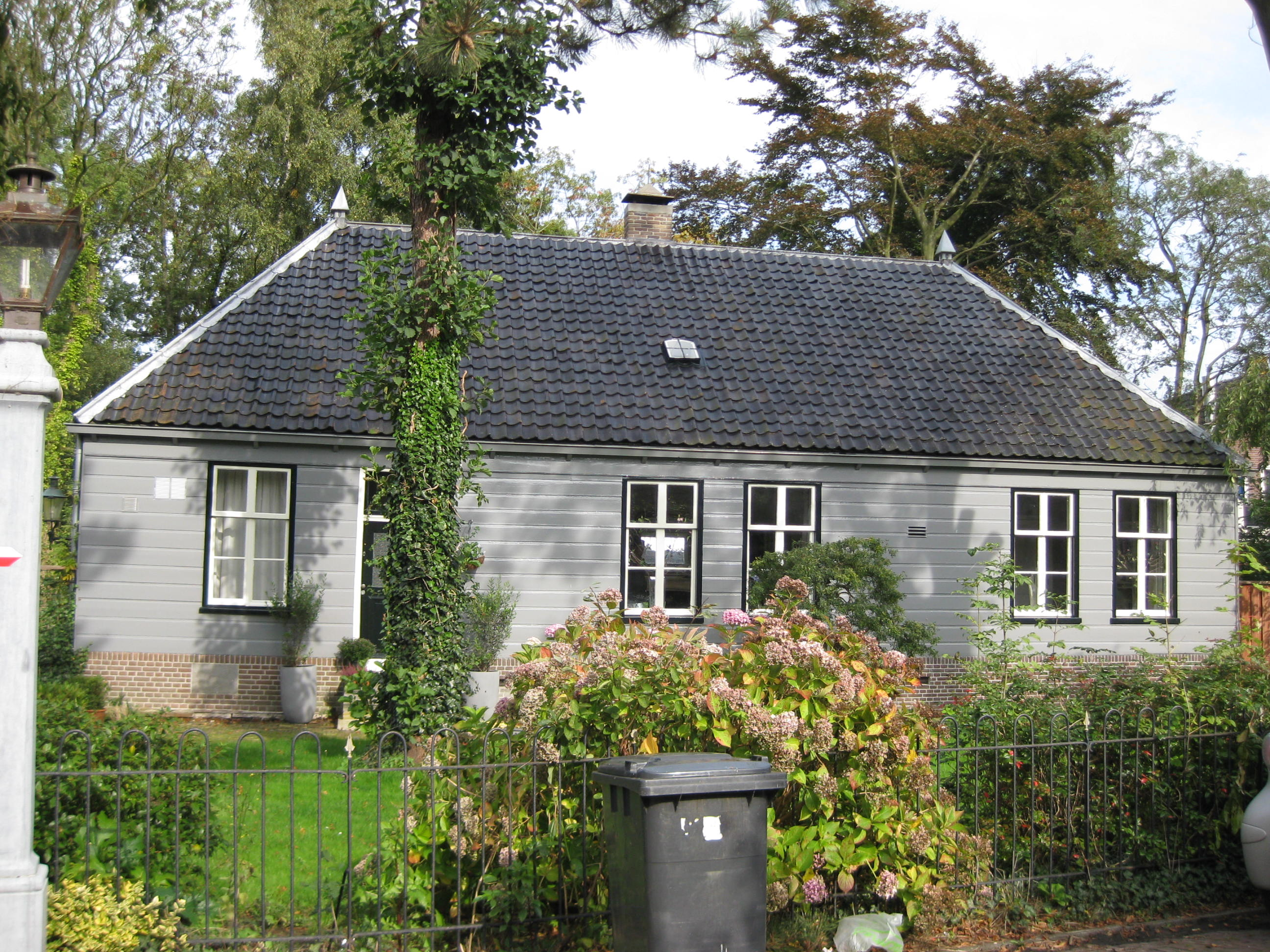 Dorpsstraat 17, Broek in Waterland